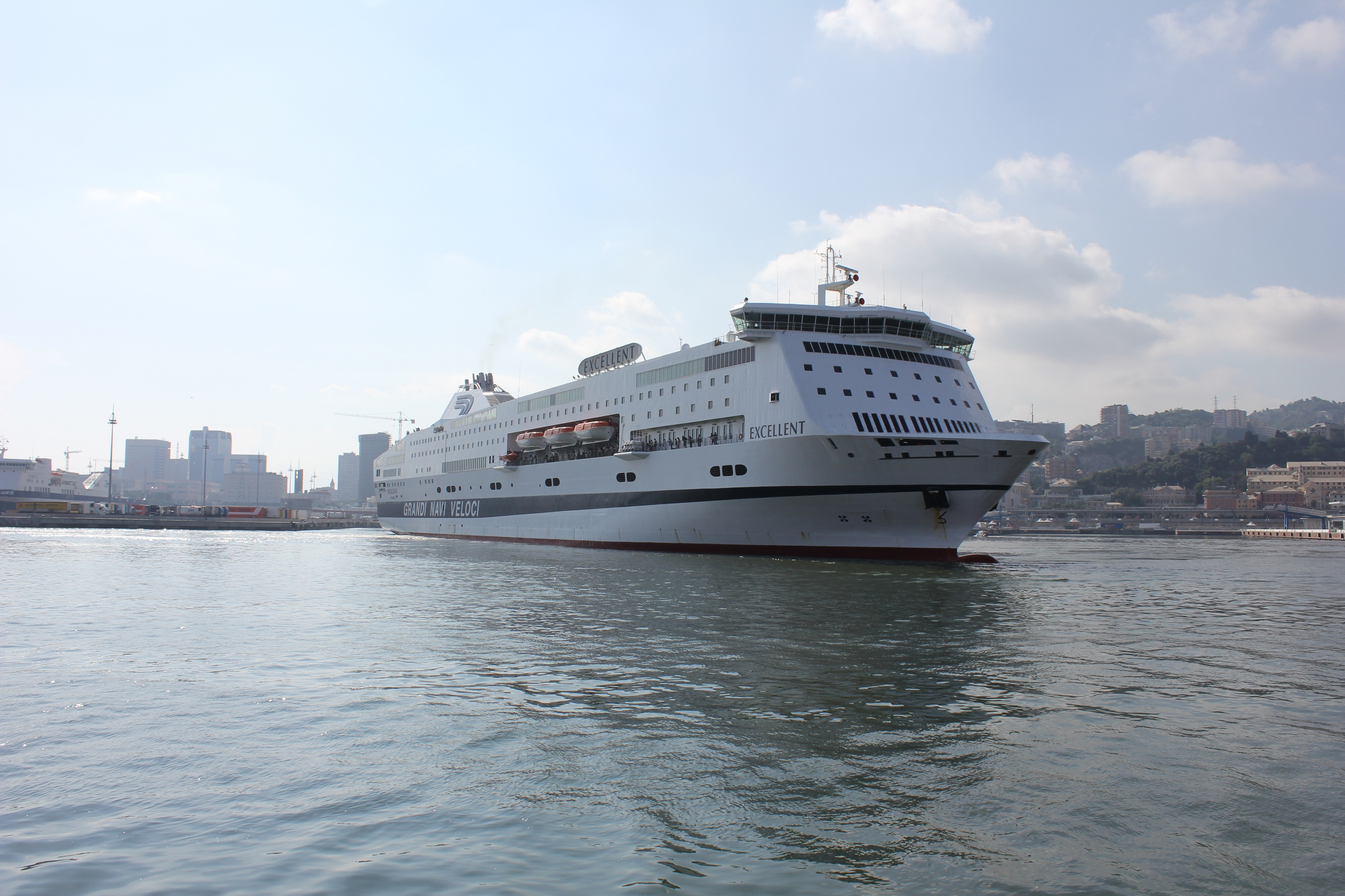 Il traghetto "Excellent" in evoluzione nel porto di Genova